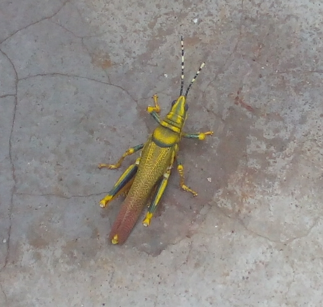 Poekilocerus pictus1